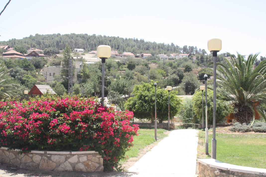 מושב מטע Mata, Israel